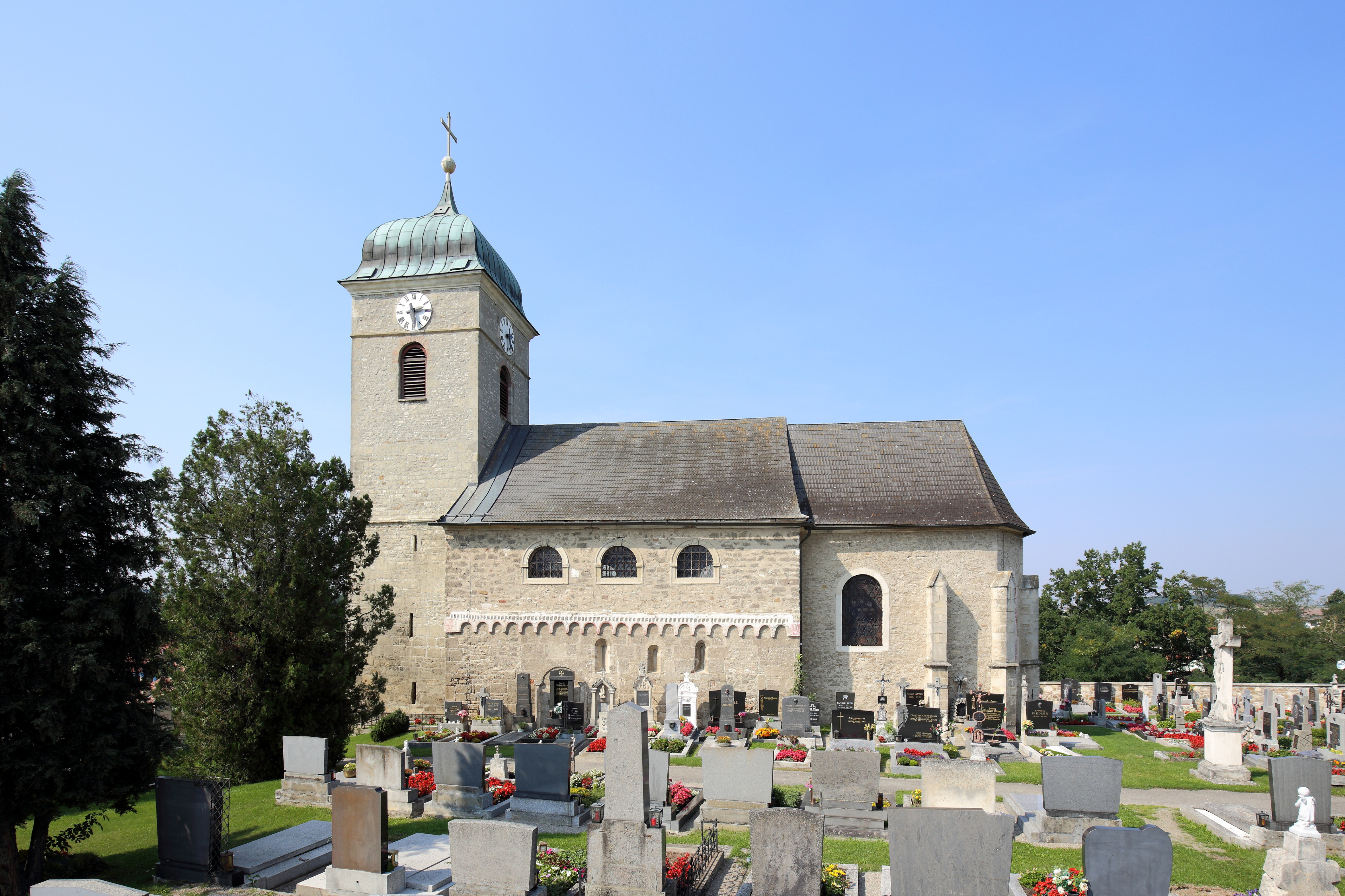 Südansicht der katholischen Pfarrkirche hl. Michael in Burgschleinitz, ein Ortsteil der niederösterreichischen Marktgemeinde Burgschleinitz-Kühnring. Das Langhaus mit dem steinsichtigen Quadermauerwerk und Rundbogenfries aus dem 12. Jahrhundert ist romanisch und wurde von 1728 bis 1732 barockisiert. Der vorgestellte Westturm ist spätgotisch und der eingezogene frühgotische Chor wurde Ende des 13. Jahrhunderts errichtet.